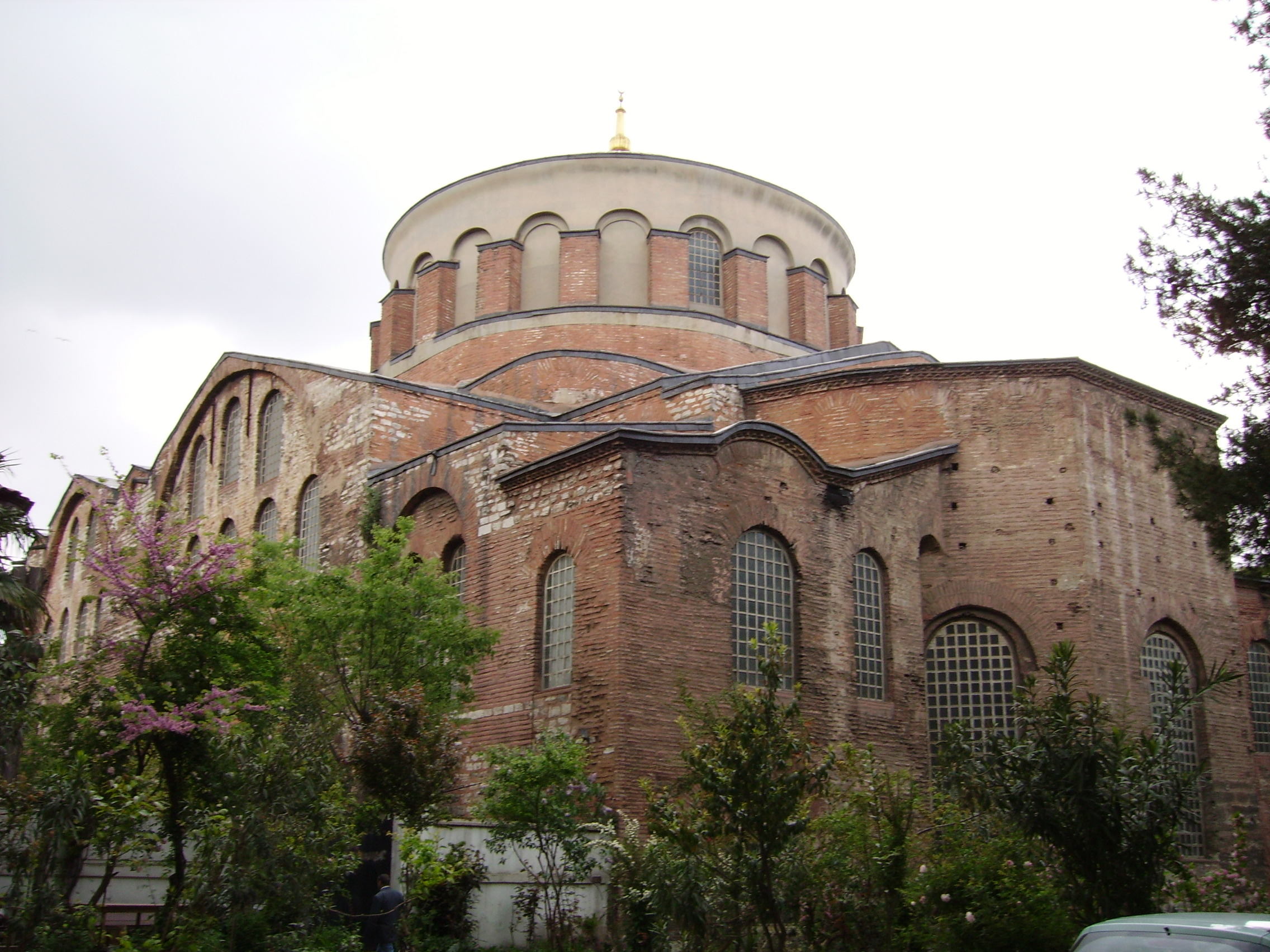 Hagia Eirene in Constantinople